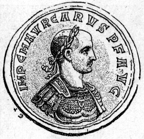 Carus aus Baumeister: Denkmäler des klassischen Altertums. 1885. Band I., Seite 374.